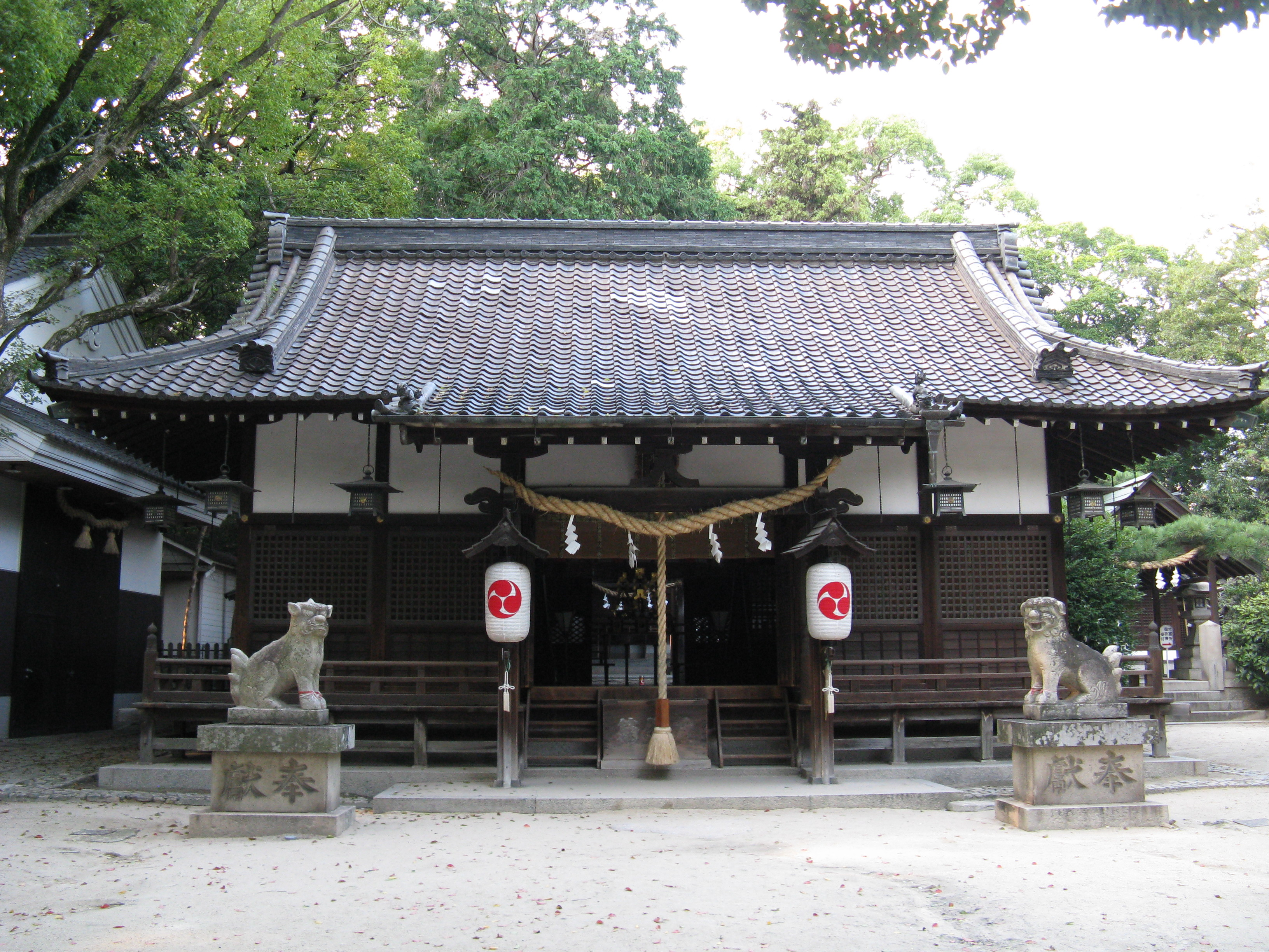 六甲八幡神社 拝殿